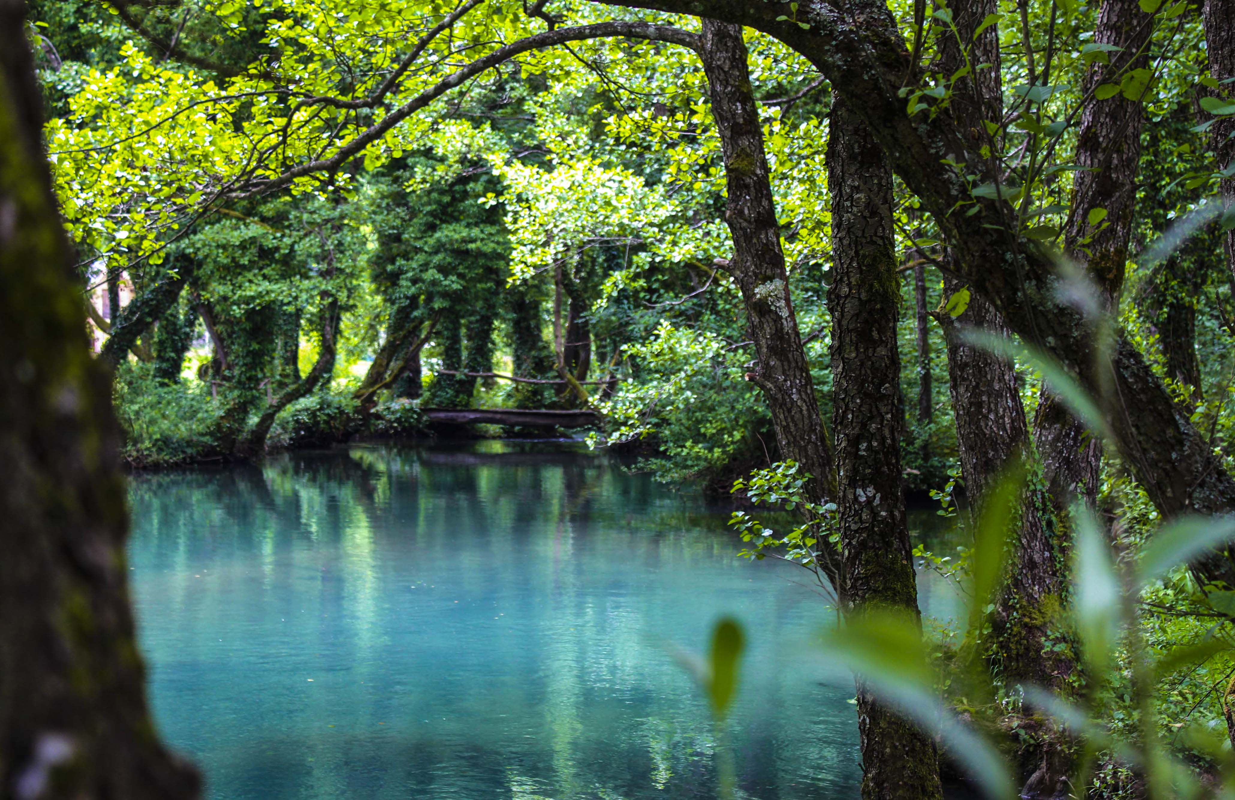 This image was uploaded as part of Trace of Soul 2019. Строги природни резерват „Прашума Јањ""